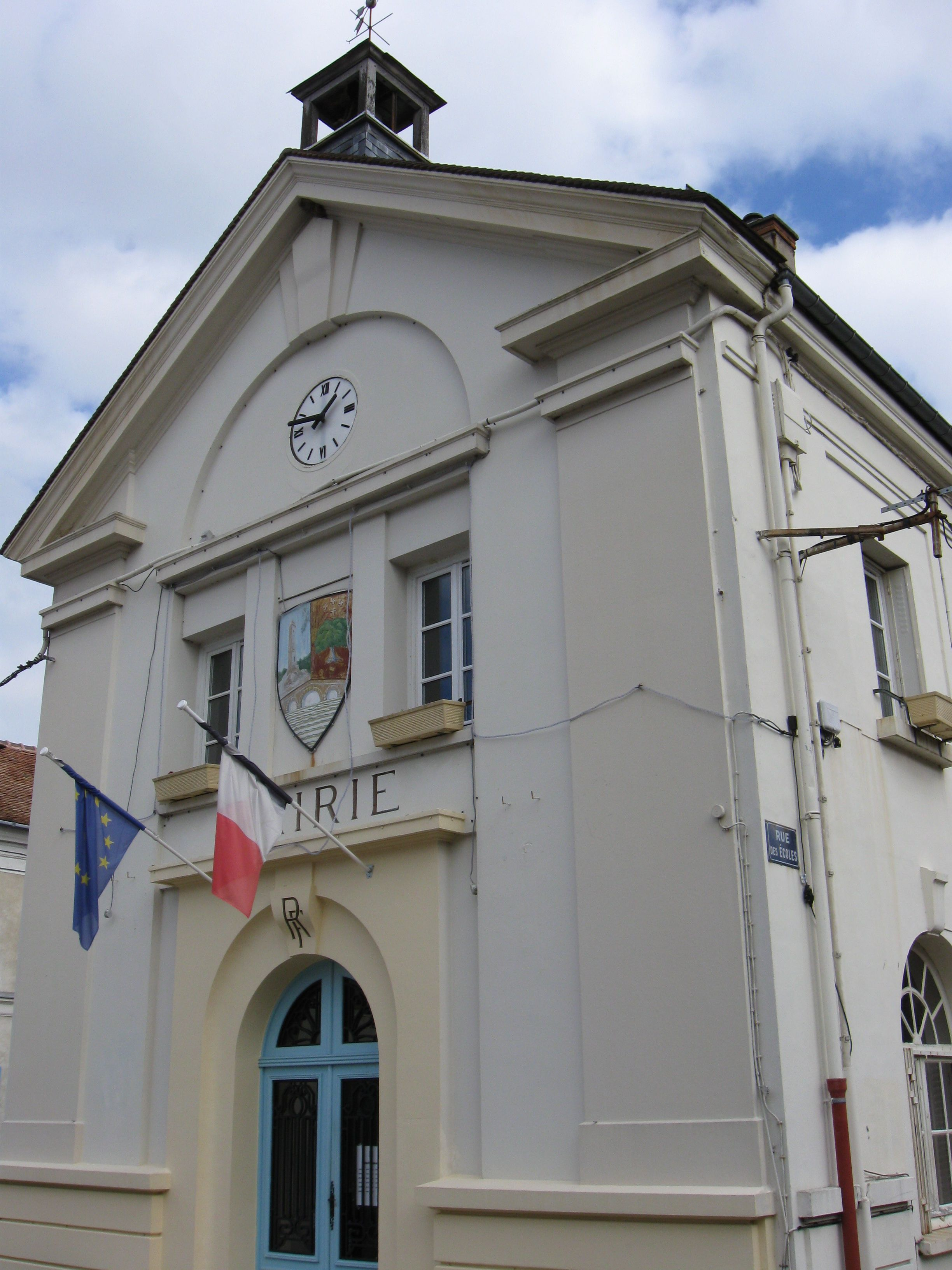 Mairie de Samois-sur-Seine. (Seine-et-Marne, région Île-de-France).